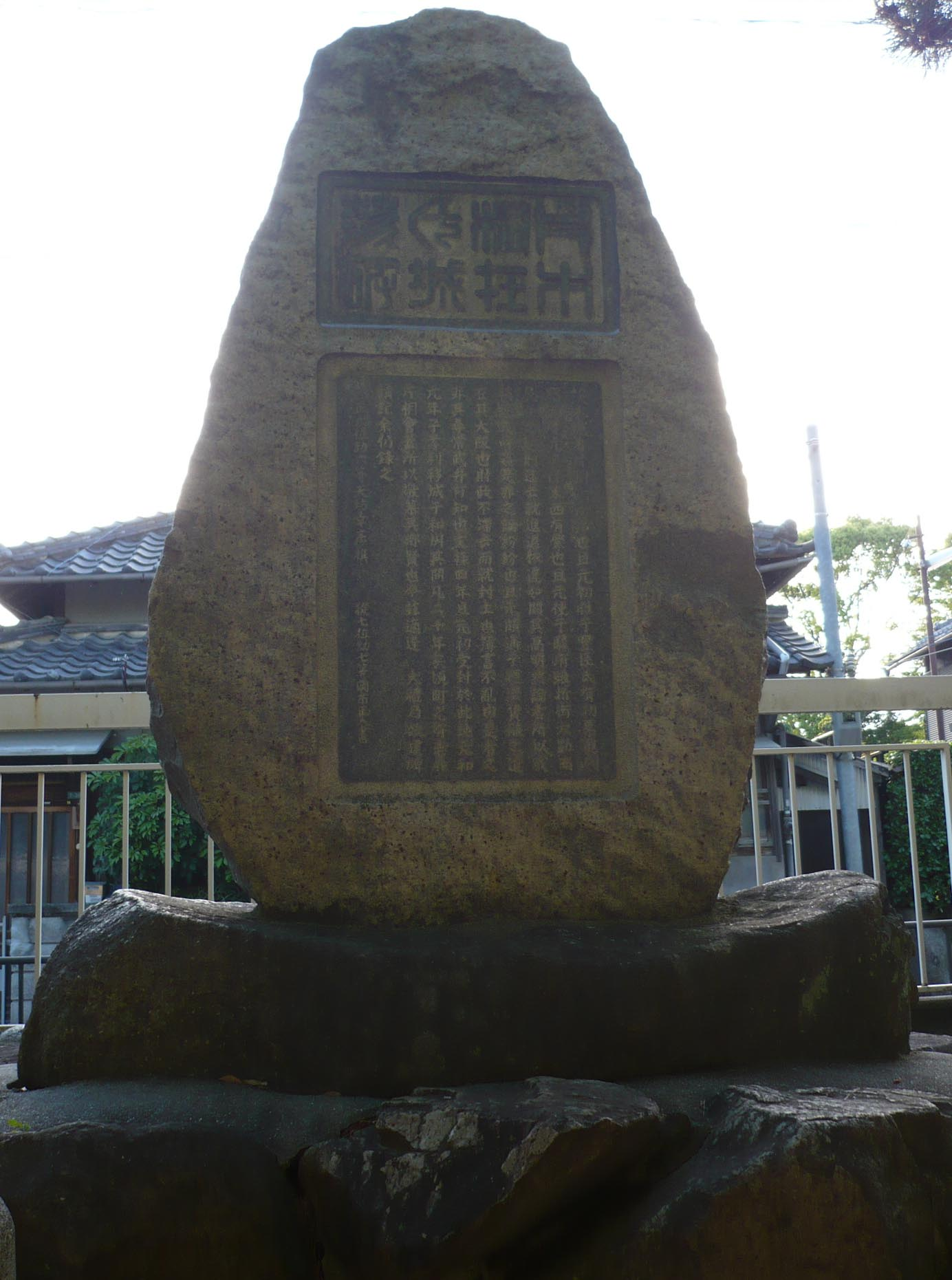 石碑